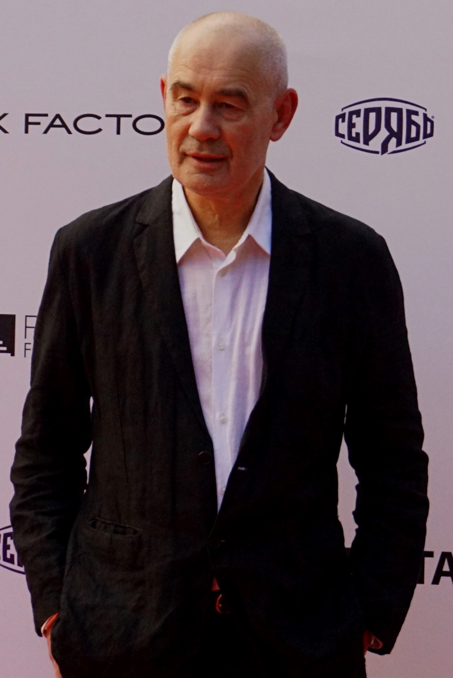 Серге́й Влади́мирович Бодро́в (28 июня 1948 года, Хабаровск) — советский и российский кинорежиссёр, сценарист, продюсер, отец актёра и кинорежиссёра Сергея Бодрова-младшего. Номинант на премию «Золотой глобус» и премию «Оскар». Кинотавр-2016, Сочи.